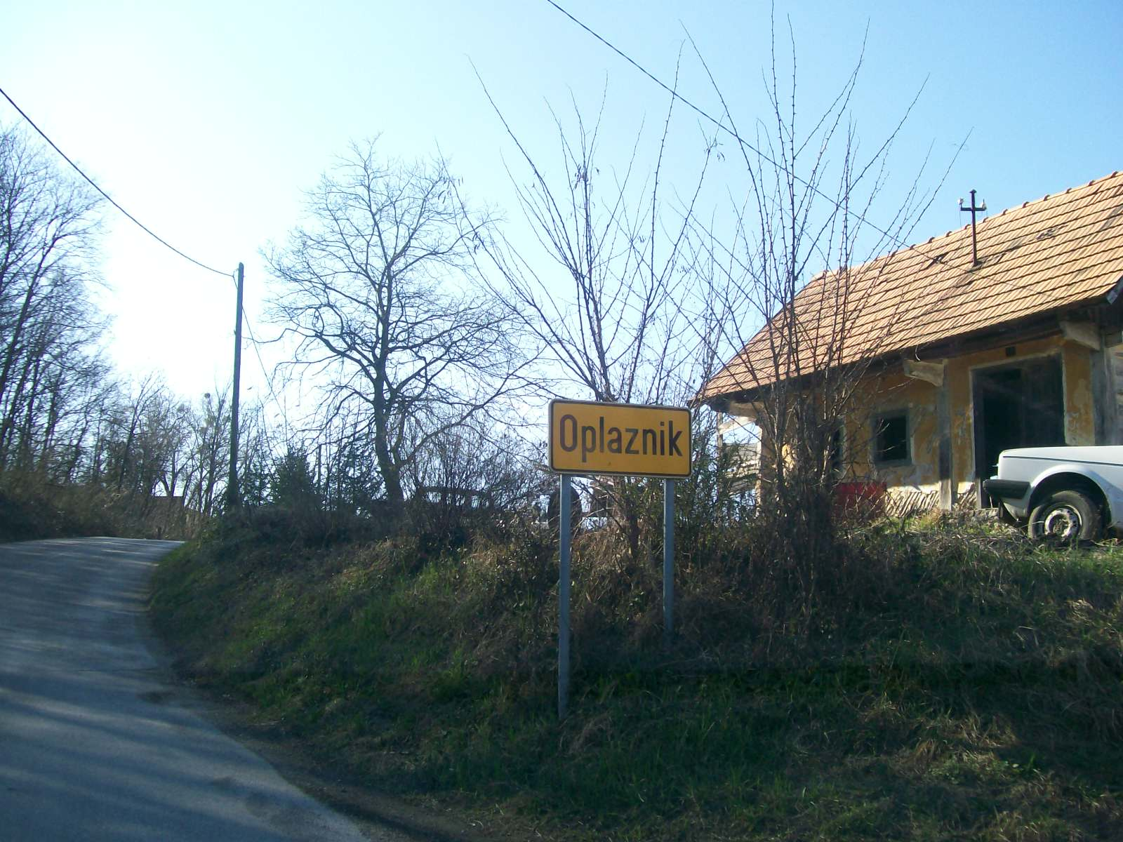 Ulaz u selo Oplaznik, općina Marija Gorica, Zagrebačka županija